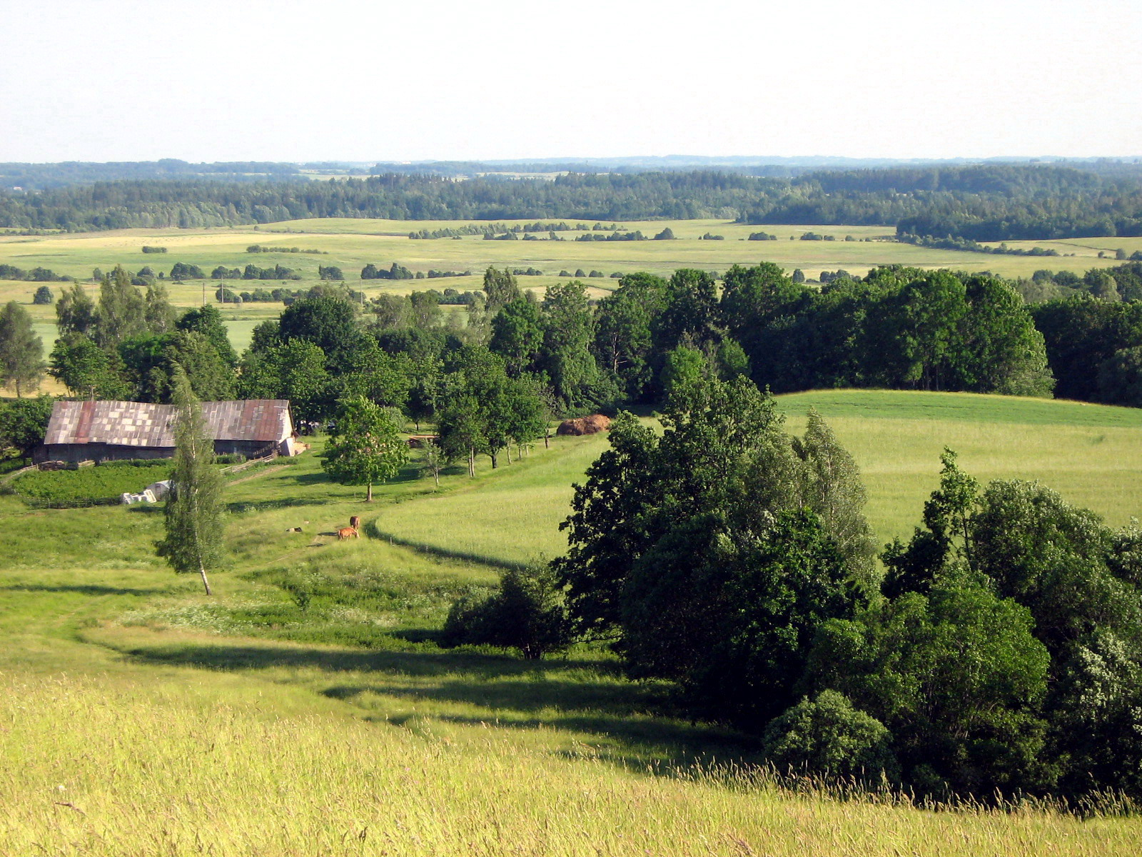 Tverų seniūnija Foto: Algirdas, 2007-06-12